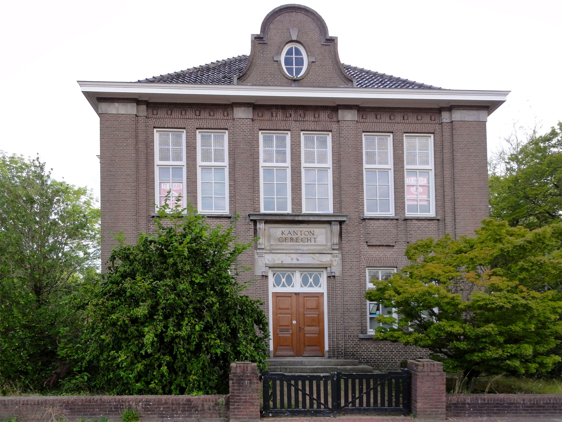 Gerechtsgebouw, Hoofdstraat 85 Beetsterzwaag